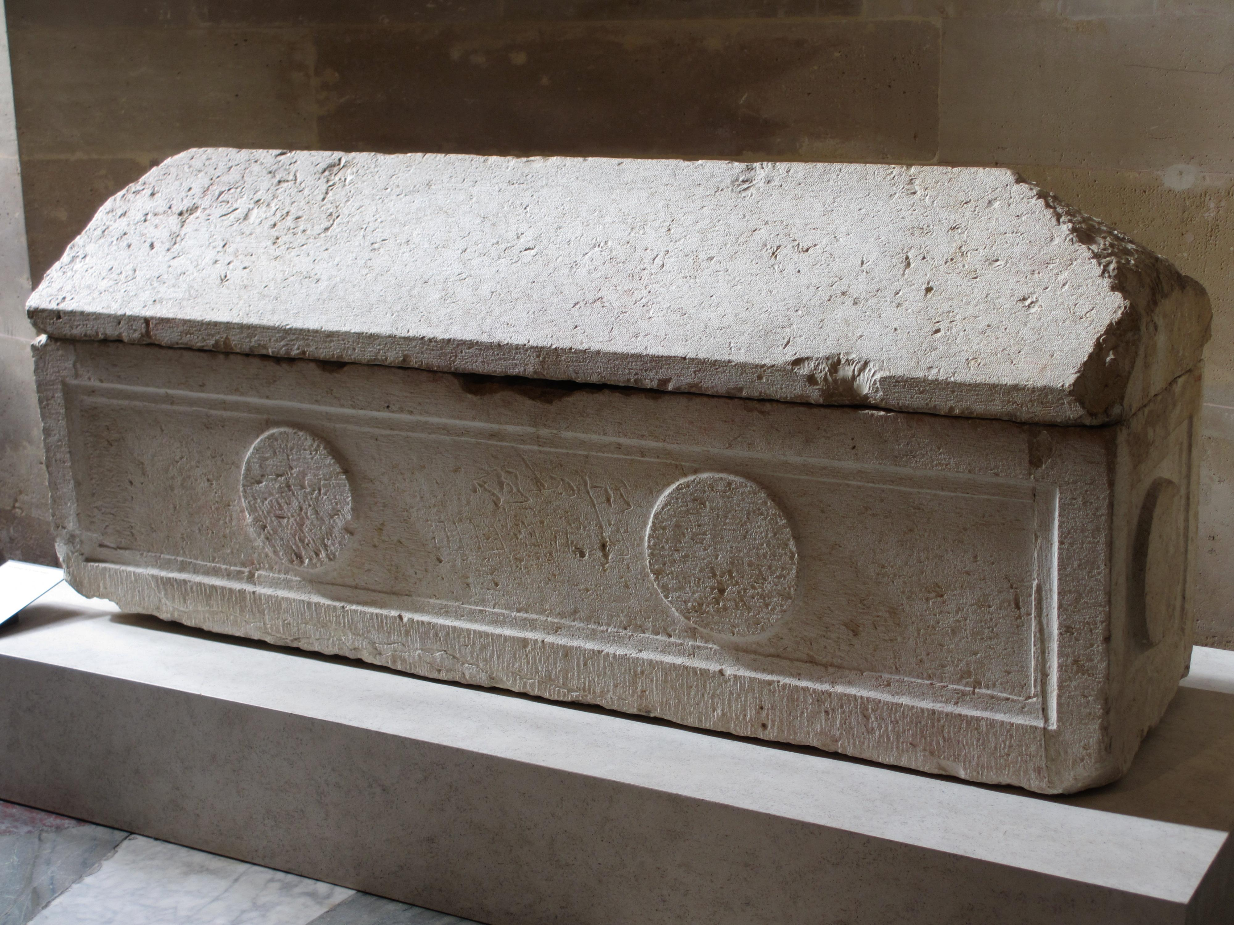 Ce sarcophage a été découvert dans le tombeau, dans une chambre souterraine inviolée dont l’accès avait été condamné par une porte en pierre (AO 5056). Installé dans une niche voûtée, le sarcophage à couvercle en double pente ne portait d’autre décor qu’une double inscription, gravée à la hâte, mentionnant en hébreu et en araméen « la reine Saddan ». Celle-ci, que Saulcy avait d’abord identifiée à une princesse de la lignée de David, est la reine connue sous le nom d’Hélène, reine d’Adiabène.